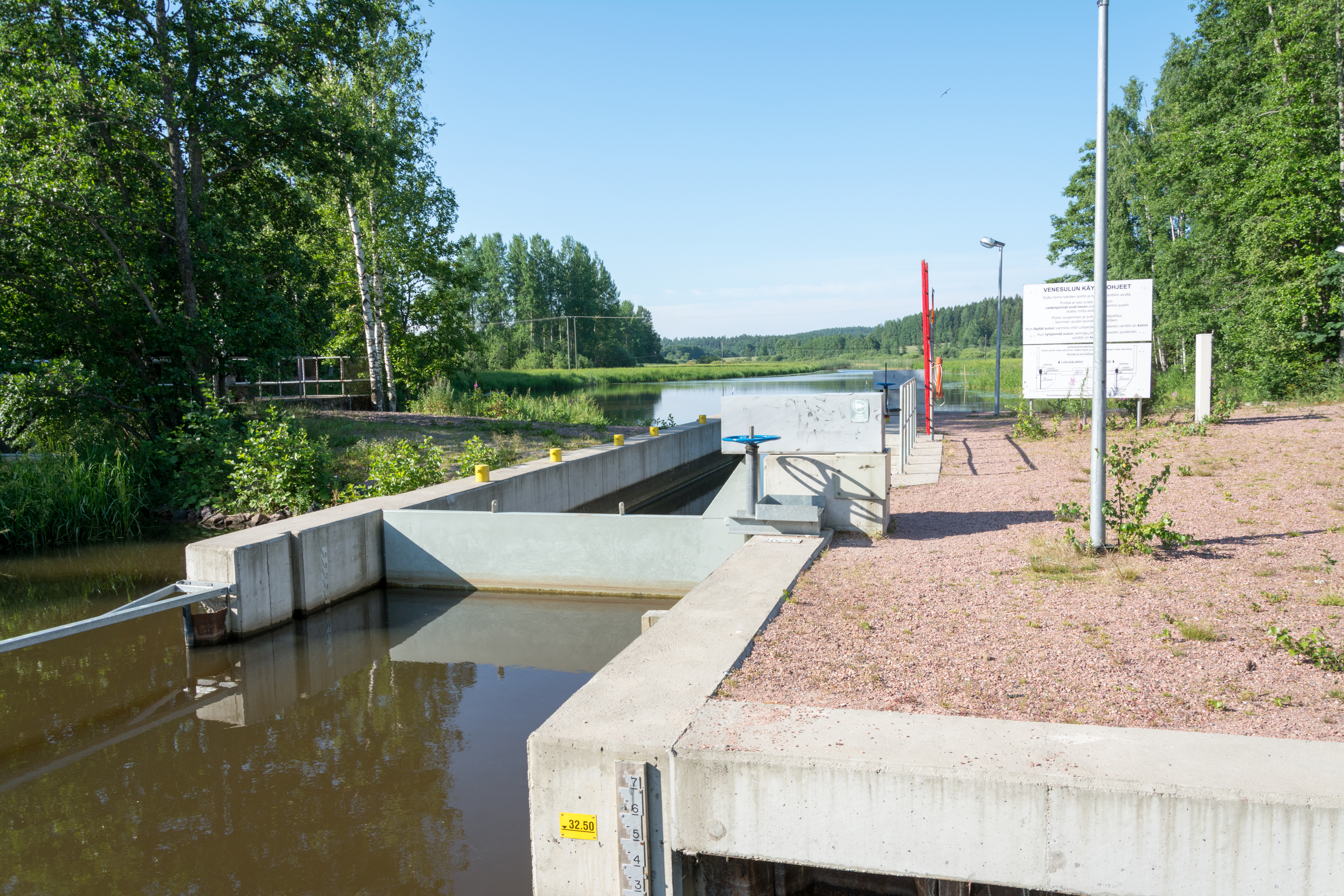 Vääntenjoen sulku Lohjalla